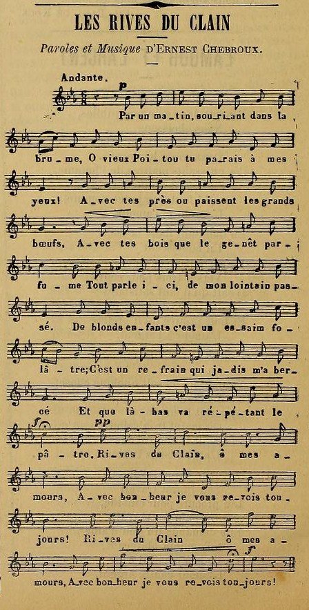 Musique d'Ernest Chebroux pour sa chanson Les rives du Clain.